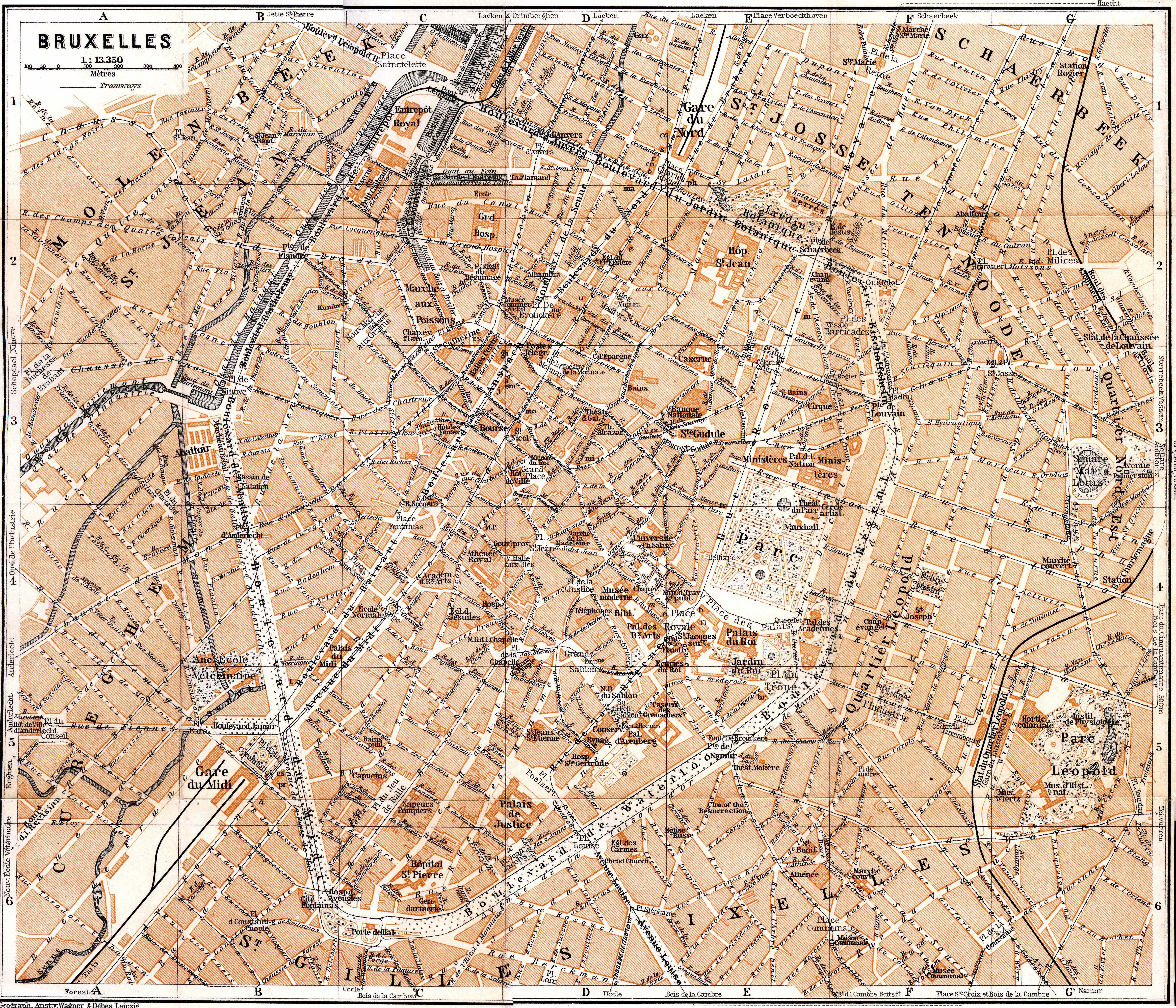 Inlegkaart van Brussel uit de Baedeker reisgids van 1905